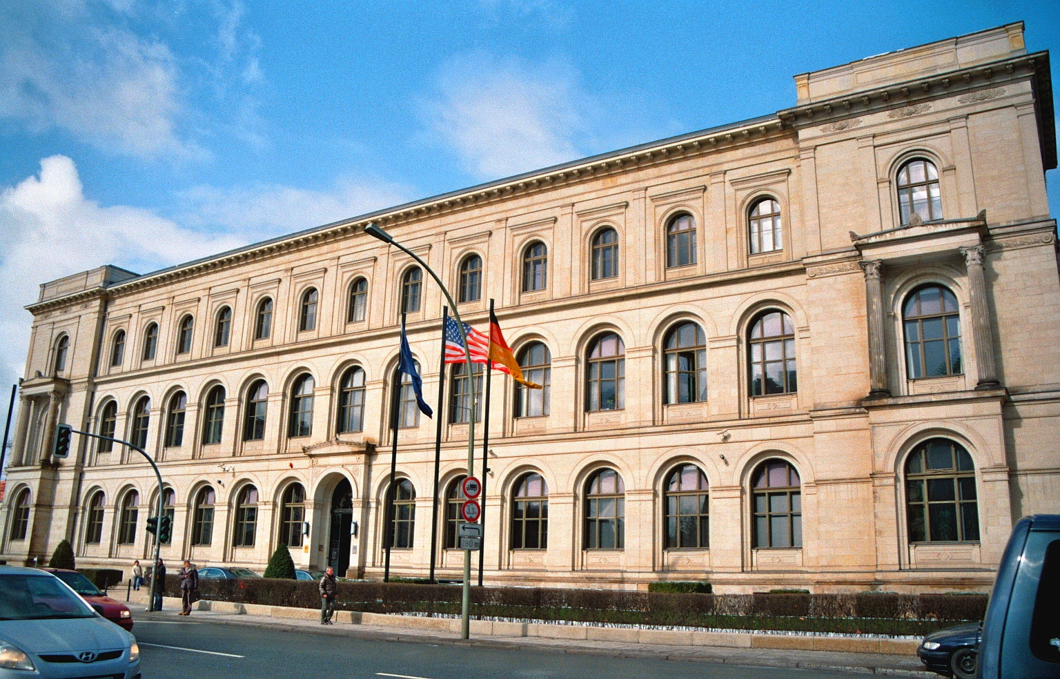 Hauptgebäude des Bundesministeriums für Verkehr, Bau und Stadtplanung in der Invalidenstraße 44 in Berlin-Mitte, erbaut 1875-1878 von August Thiede als Preußische Bergakademie und Geologische Landesanstalt. Sie wurde in einem städtebaulichen Zusammenhang mit dem benachbarten Naturkundemuseum und der Landwirtschaftlichen Hochschule auf dem ehemaligen Gelände der Königlichen Eisengießerei errichtet. Die vierflügelige Anlage mit zentraler Oberlichthalle und Lichthof besitzt eine klassizistische Fassade mit großen Rundbogenfenstern, Mittelportal und bastionsartigen Eckfassungen. In der DDR-Zeit war das Gebäude Sitz des Ministeriums für Geologie und des Zentralen Geologischen Instituts. Beim Umbau für das Bundesverkehrsministerium wurden 1996-1997 bauliche Veränderungen vor allem im Inneren zurückgenommen. Außerdem wurden dem Komplex zwei moderne Erweiterungsbauten nach Entwürfen des Architekten Max Dudler angefügt. Das Gebäude steht als Teil der Gesamtanlage Invalidenstraße 42-44 unter Denkmalschutz.